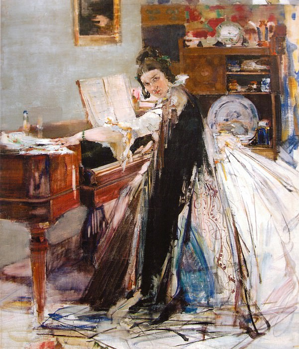 Портрет Н. М. Сапожниковой (у рояля). Национальная художественная галерея «Хазинэ». Казань, Татарстан, Российская федерация.